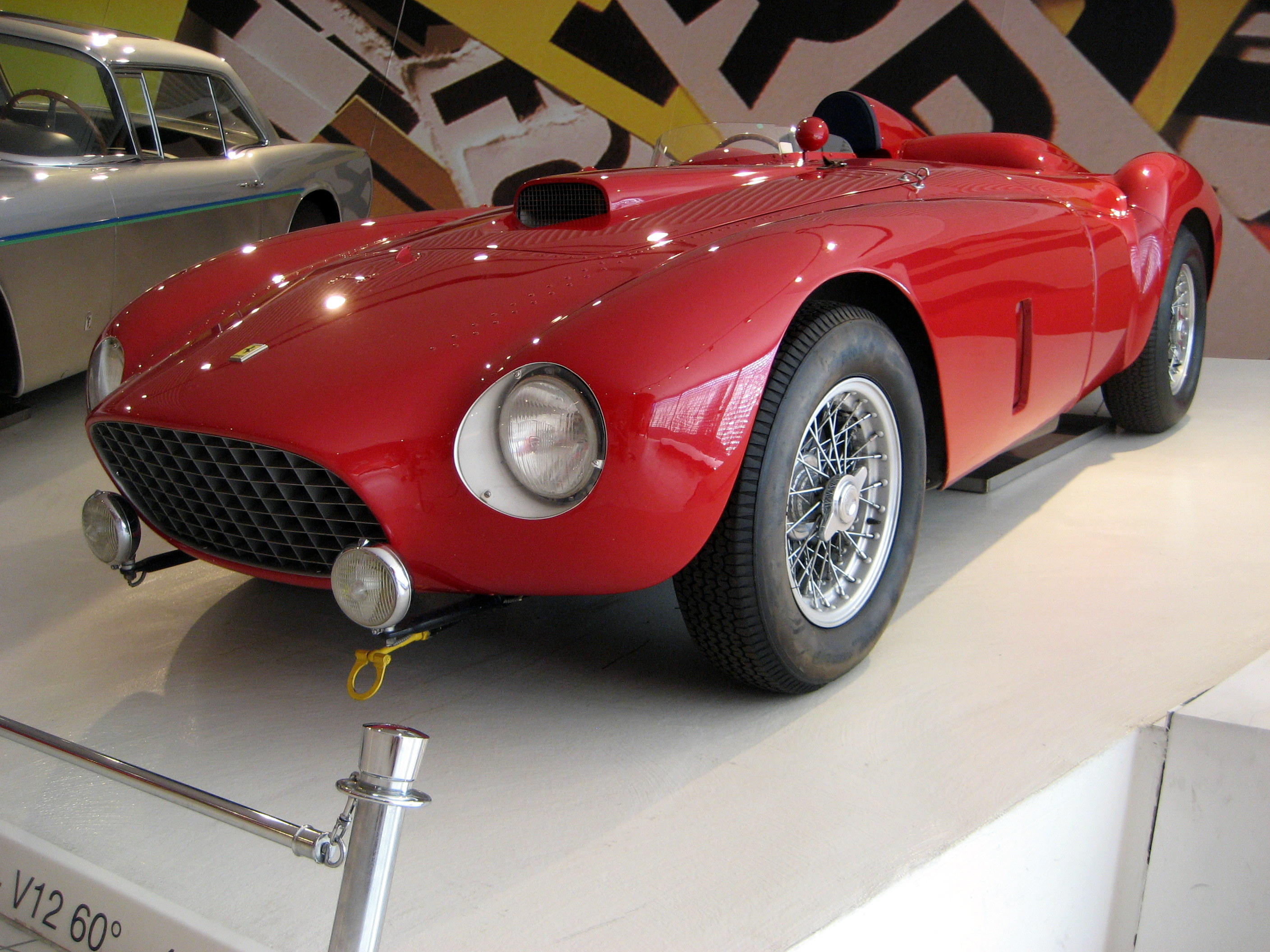 1954 Ferrari 375 Plus at Galleria Ferrari in Maranello, Italy